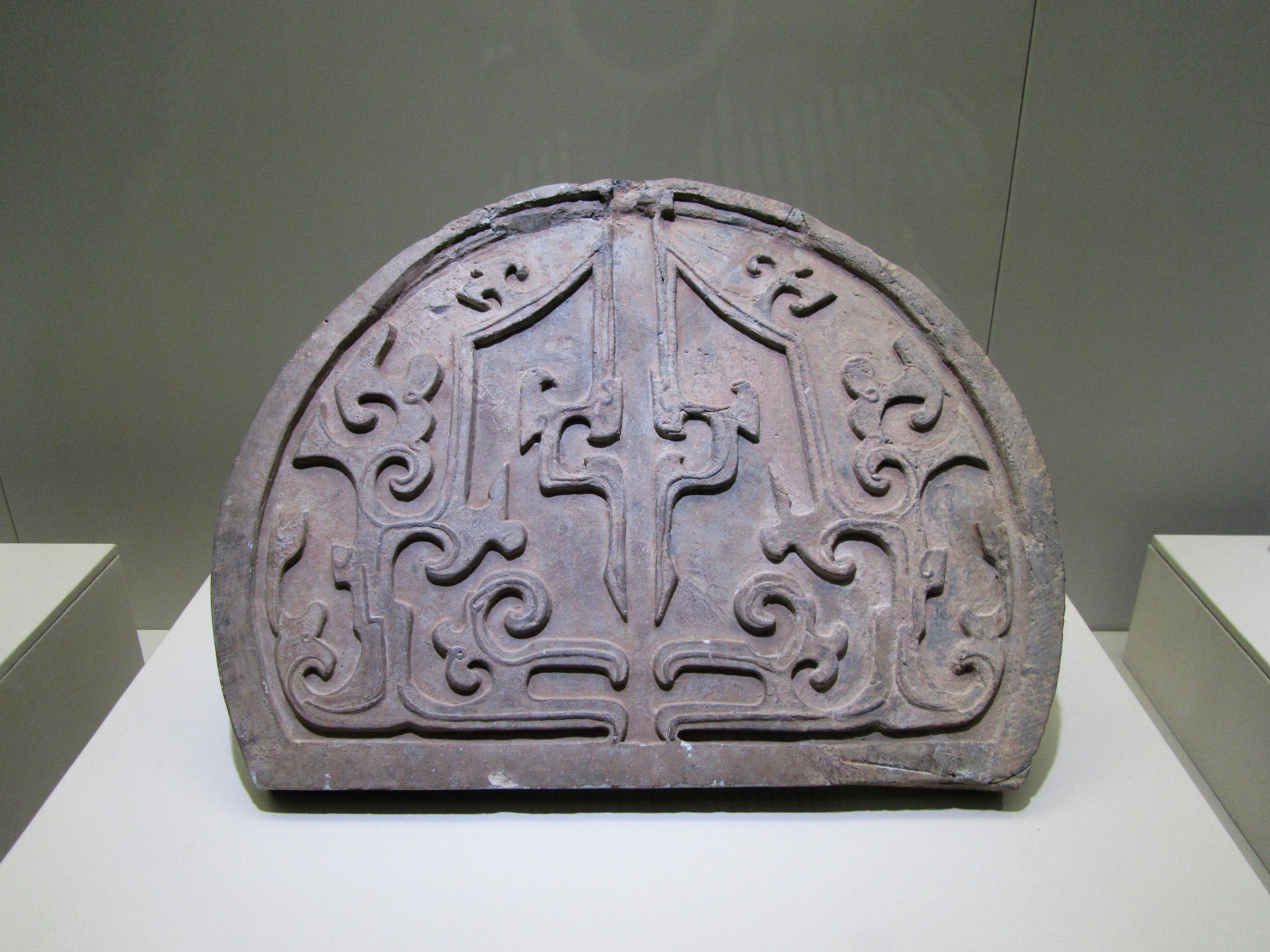 秦始皇陵区出土的夔纹大瓦当，秦始皇陵博物院藏。